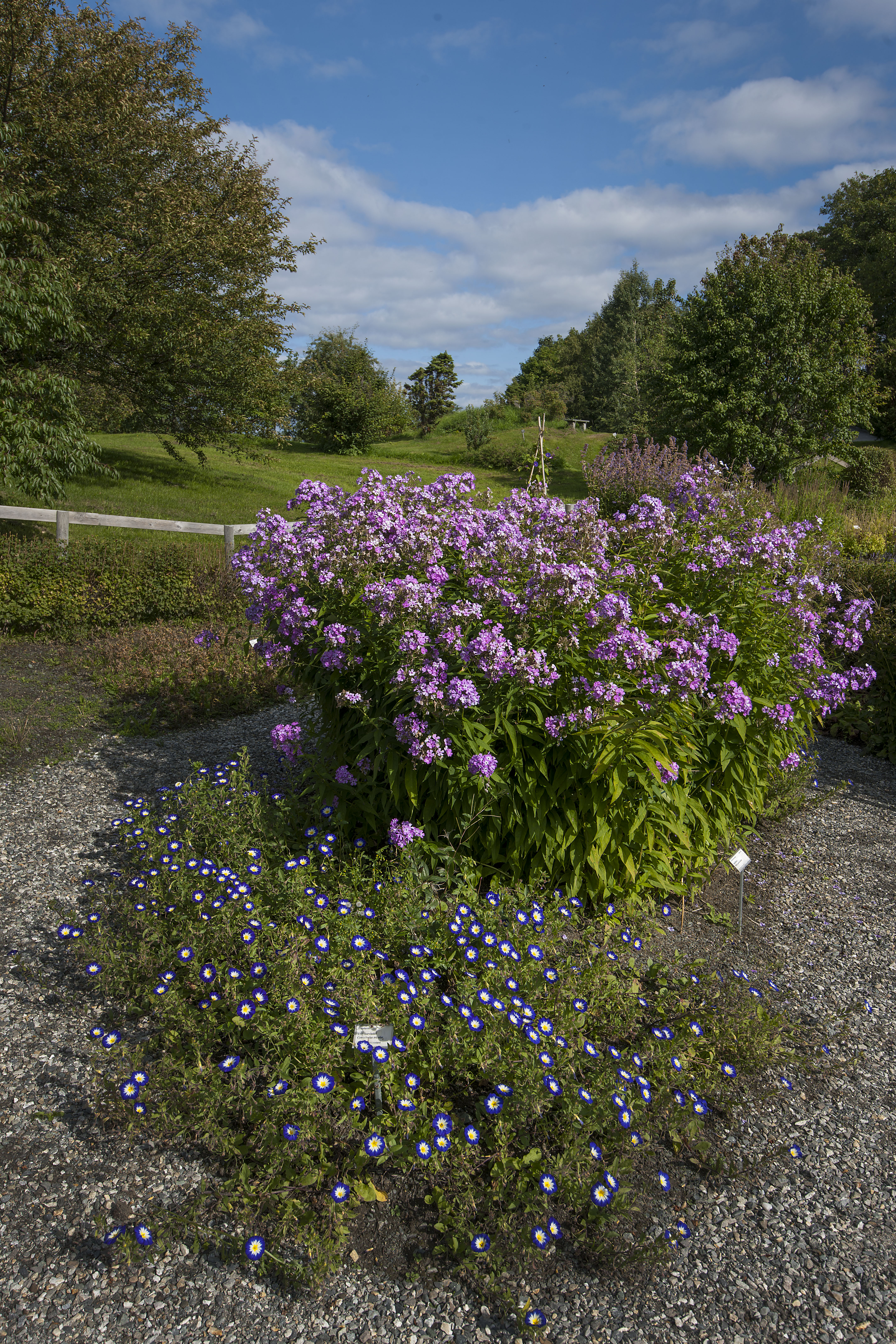 Ringve botaniske hage foto-åge hojem NTNU Vitenskapsmuseet_DSC3118